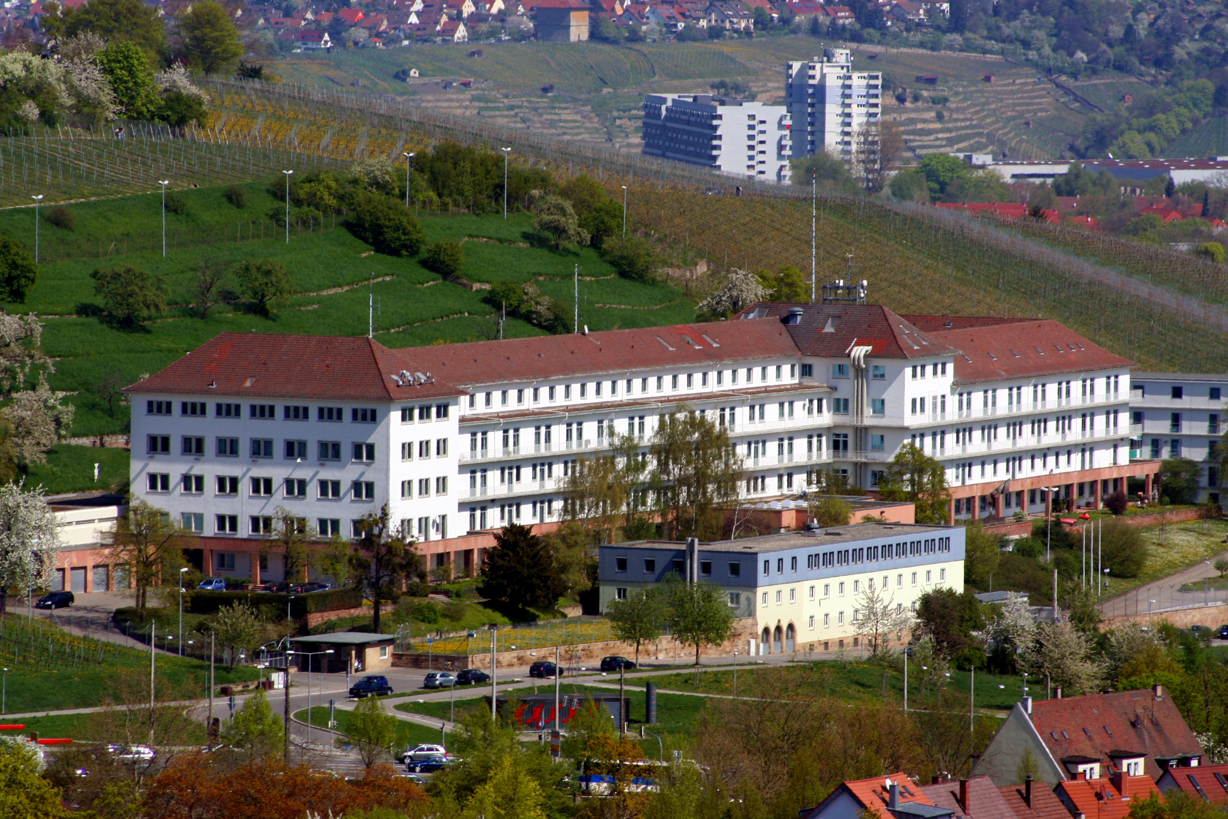 Polizeipräsidium Stuttgart im ehemaligen Robert-Bosch-Krankenhaus